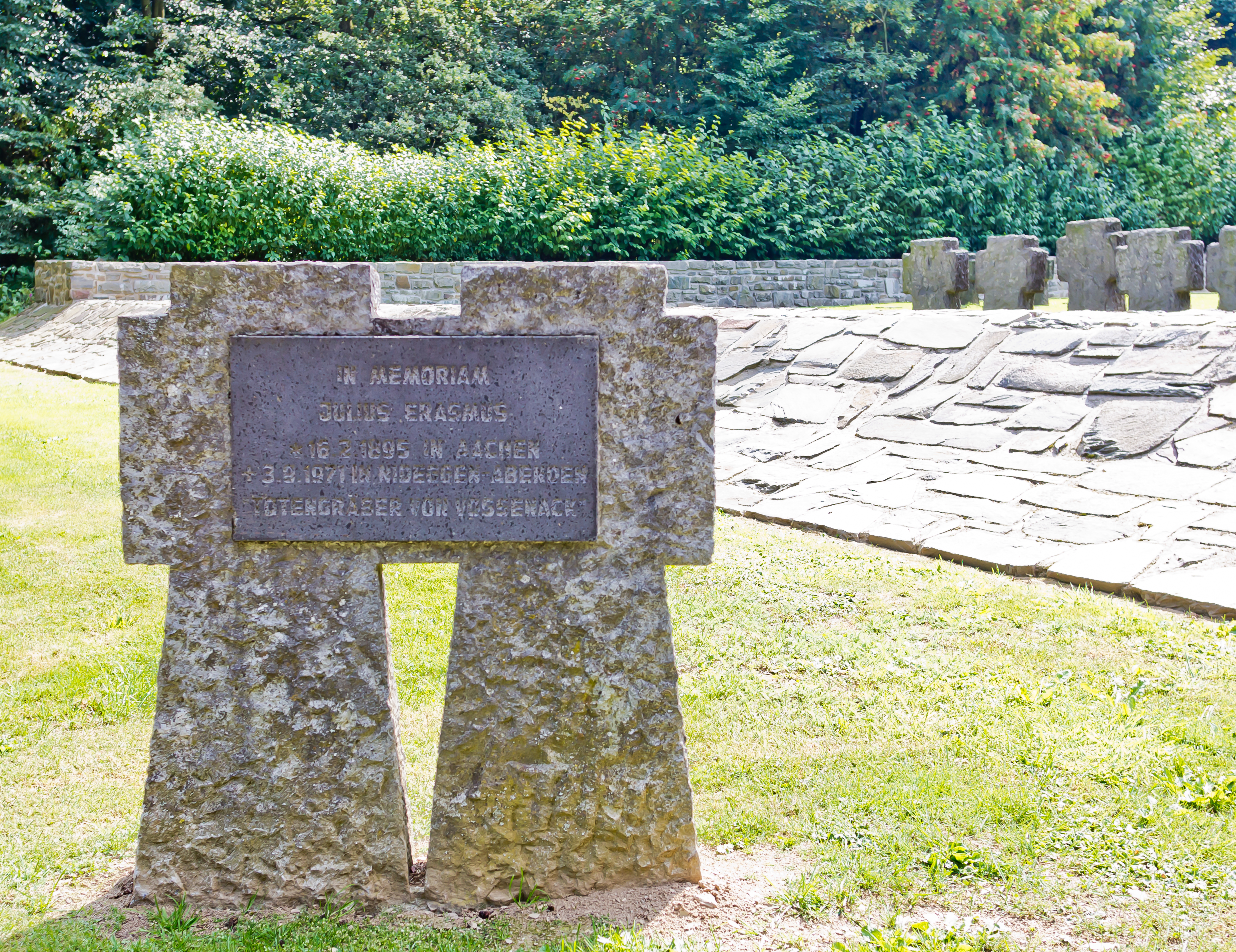 Ehrenfriedhof Vossenack - Gedenkkreuz Julius Erasmus, den „Totengräber von Vossenack“